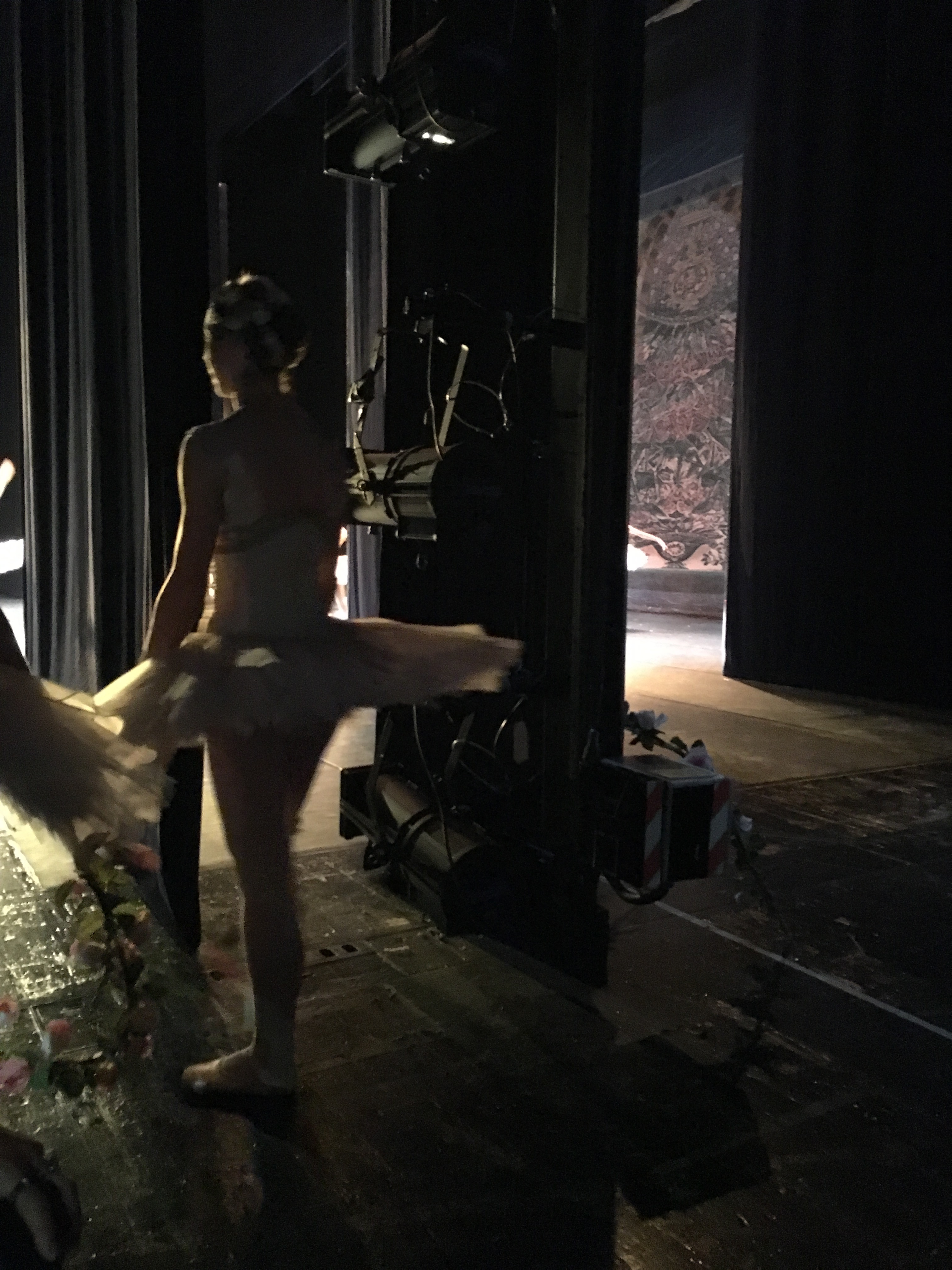 Vista de bailarina esperando para entrar a escena detrás de las patas de la cámara negra.